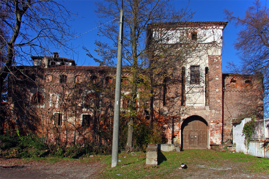 Castello di Casalgiate, frazione di Novara